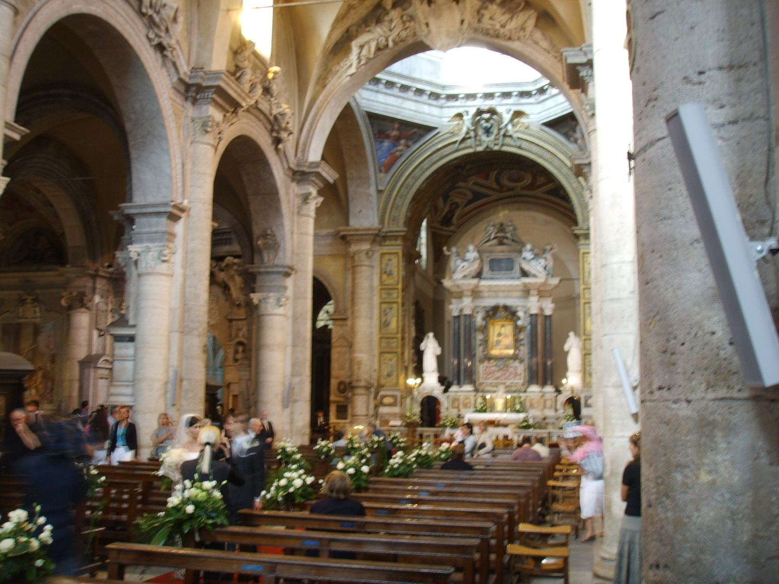 Santa Maria del Popolo, inside view in Rome, Italy